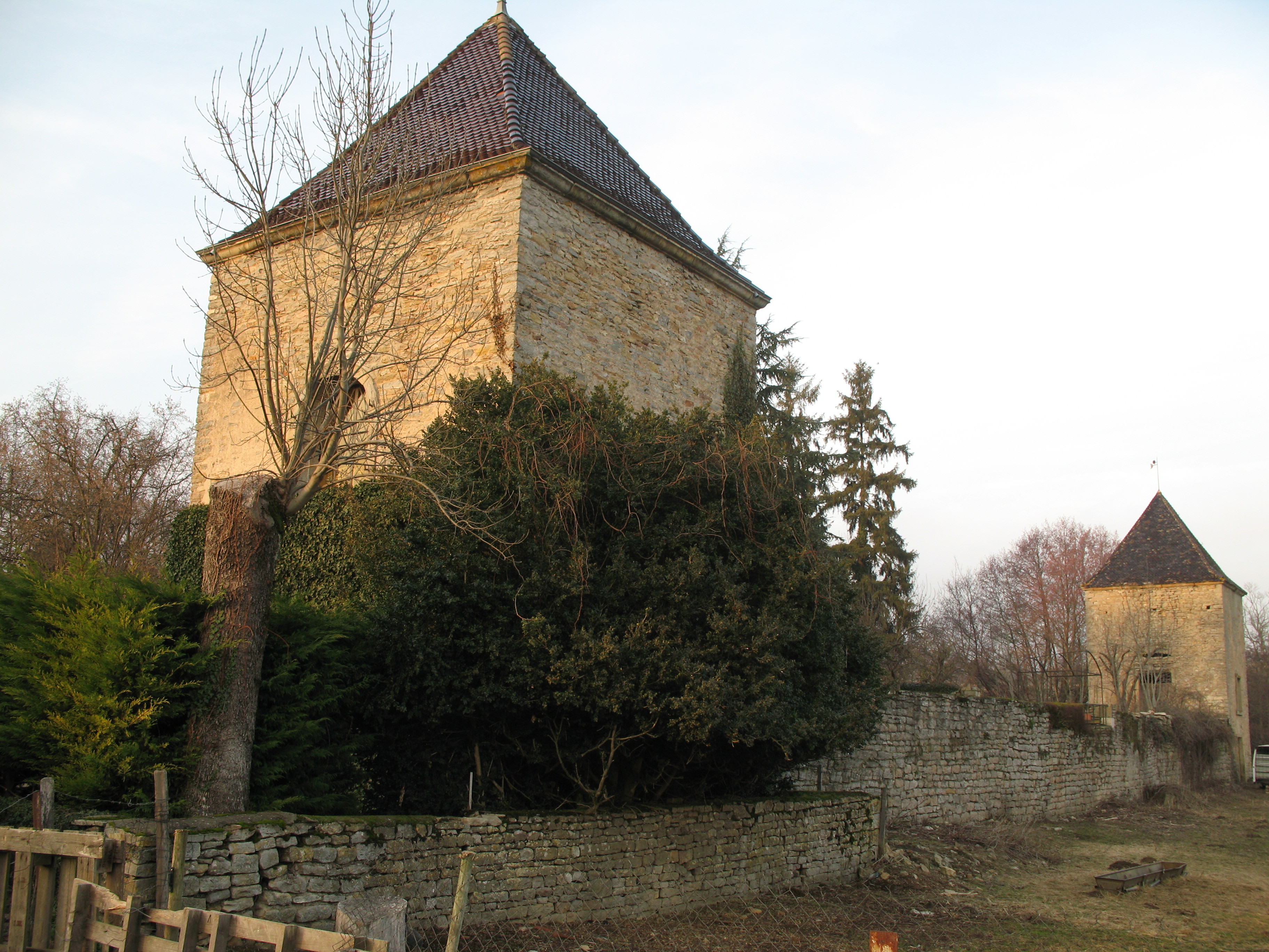 château d'Igé (Saône-et-Loire)